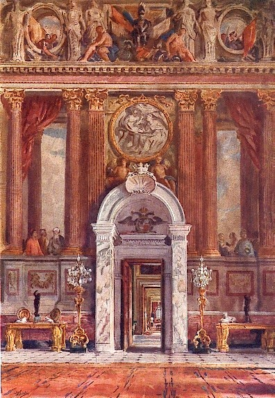 William Ranken, Le Grand salon du palais de Blenheim (vers 1918), aquarelle.